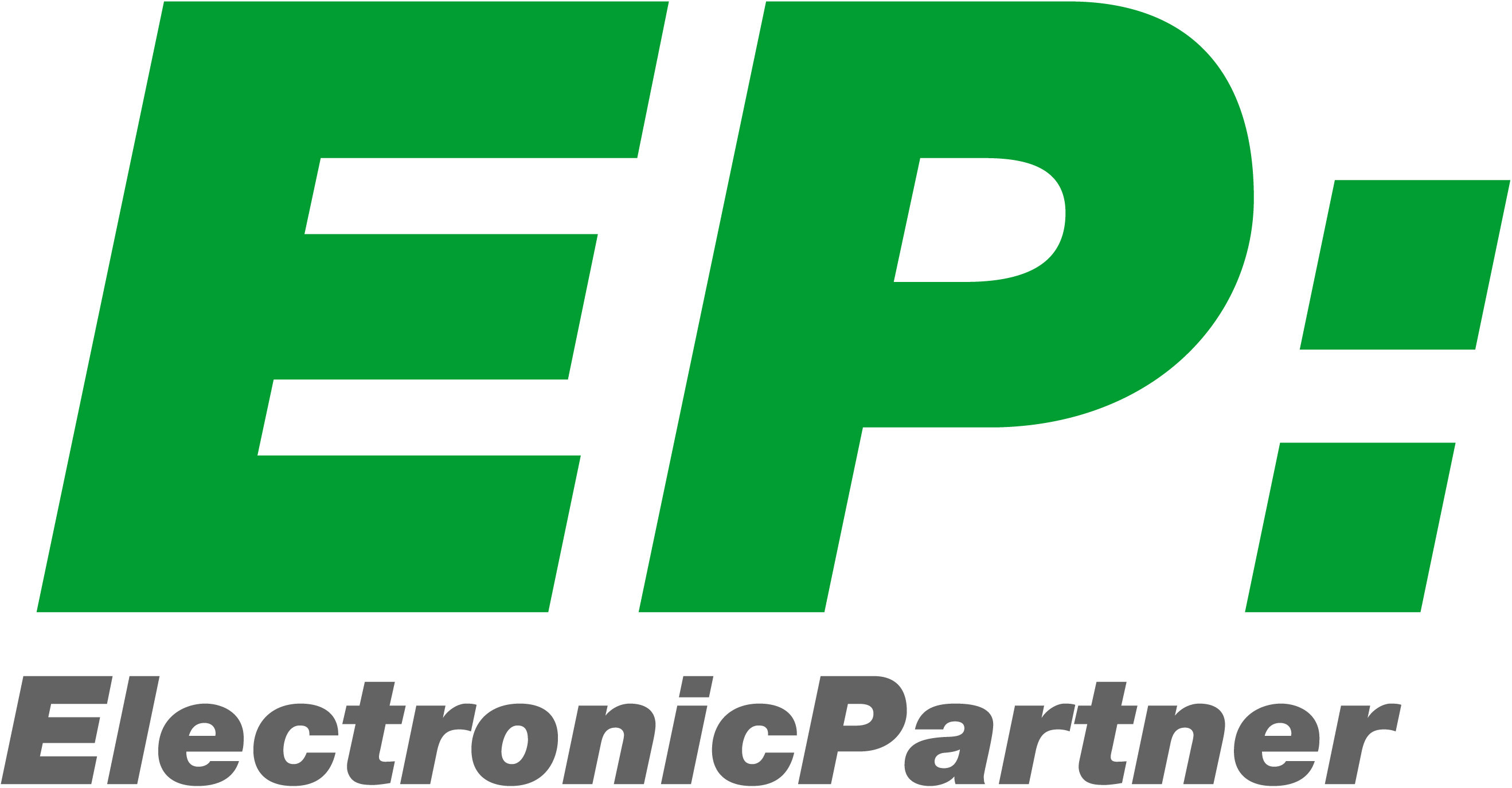 Logo EP